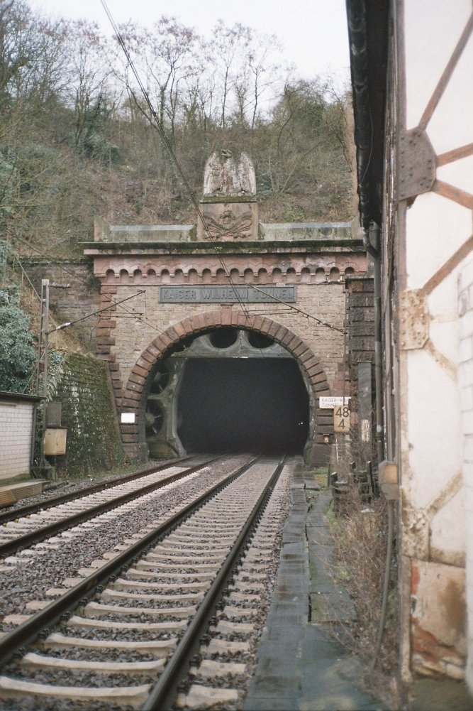 Einfahrt in den Kaiser-Wilhelm-Tunnel, eigenes Bild